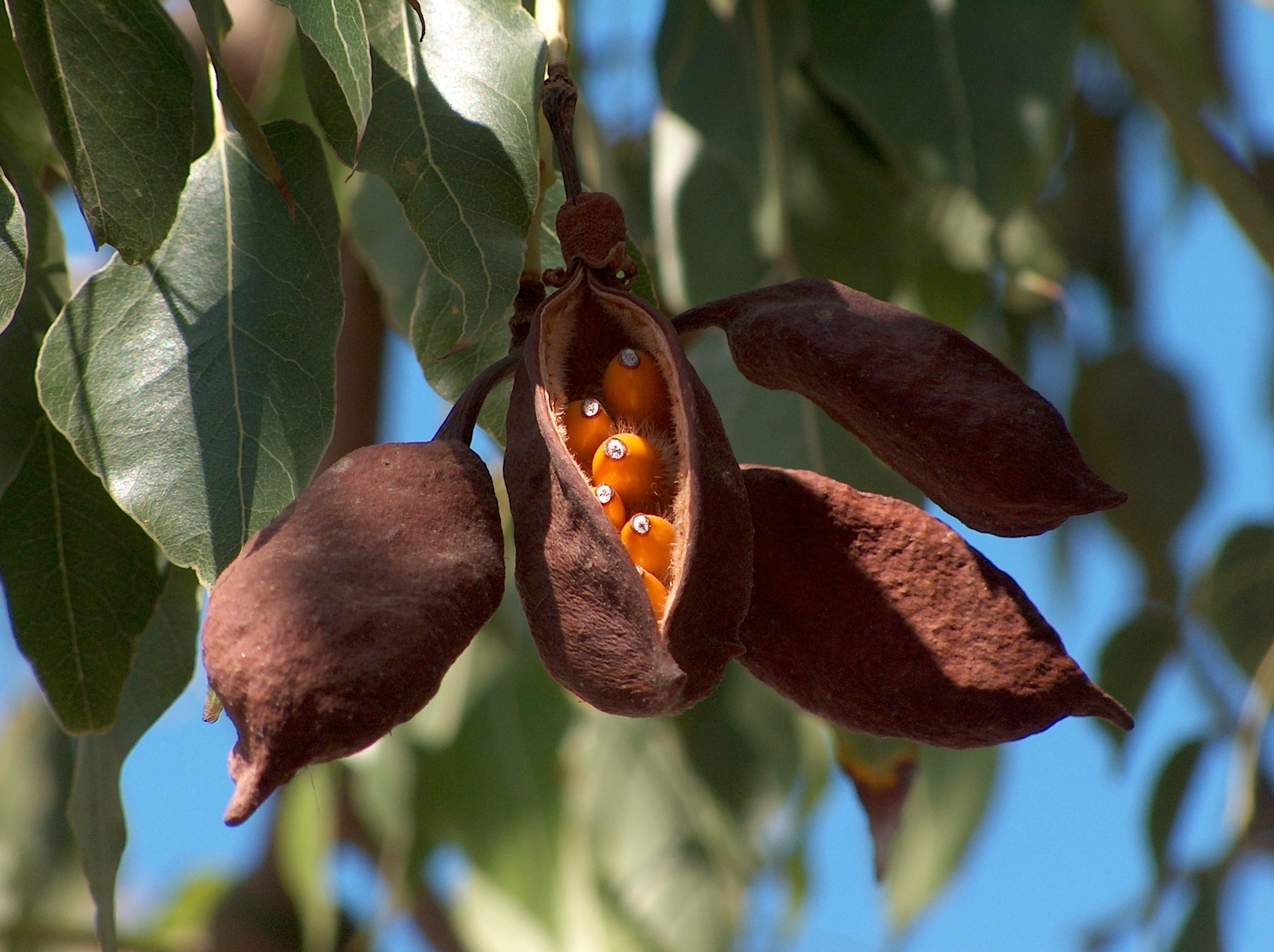 Brachychiton populneus : frutos, uno abierto con las semillas visibles dentro de sus envolturas, y otros aun no abiertos - Rambla del Charco, Águilas (Murcia, España).